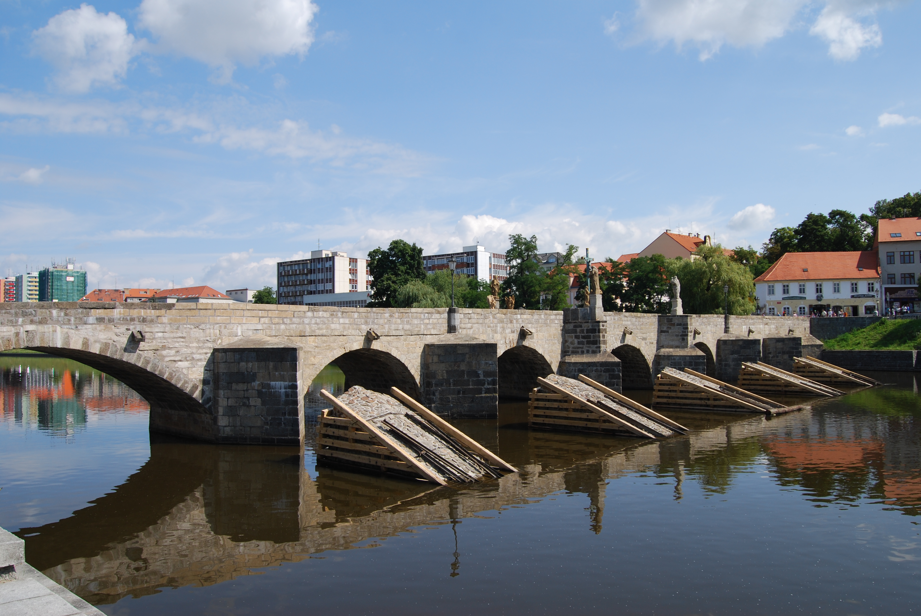 Uzavřený Kamenný most přes Otavu (srpen 2012), kvůli opravě ledolamů. Písek. Jihočeský kraj. Česká republika.